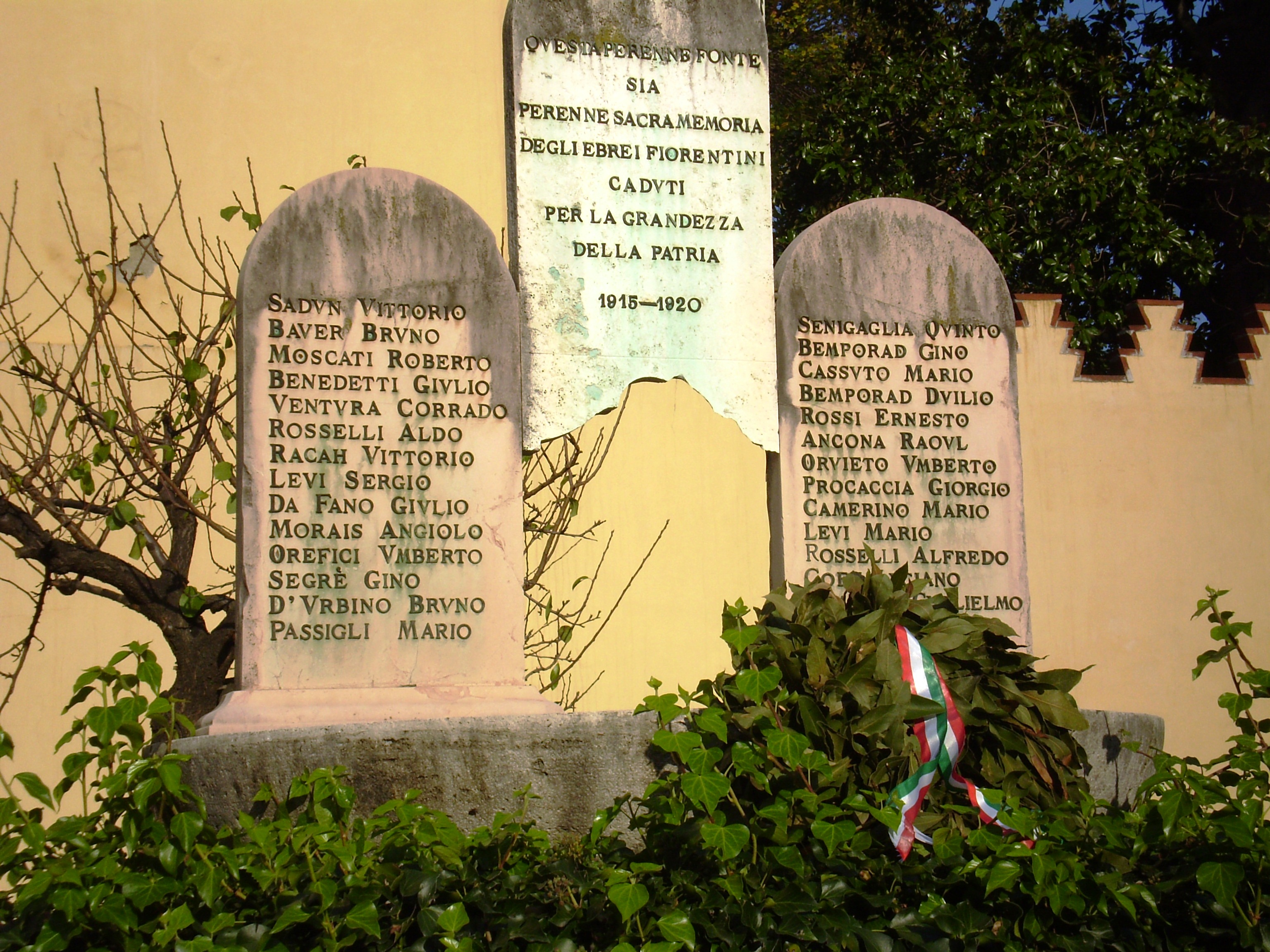 מצבת זיכרון ליהודים בני פירנצה שנפלו במלחמת העולם הראשונה - Monument à Florence pour les Juifs tombés lors de la Première guerre mondiale